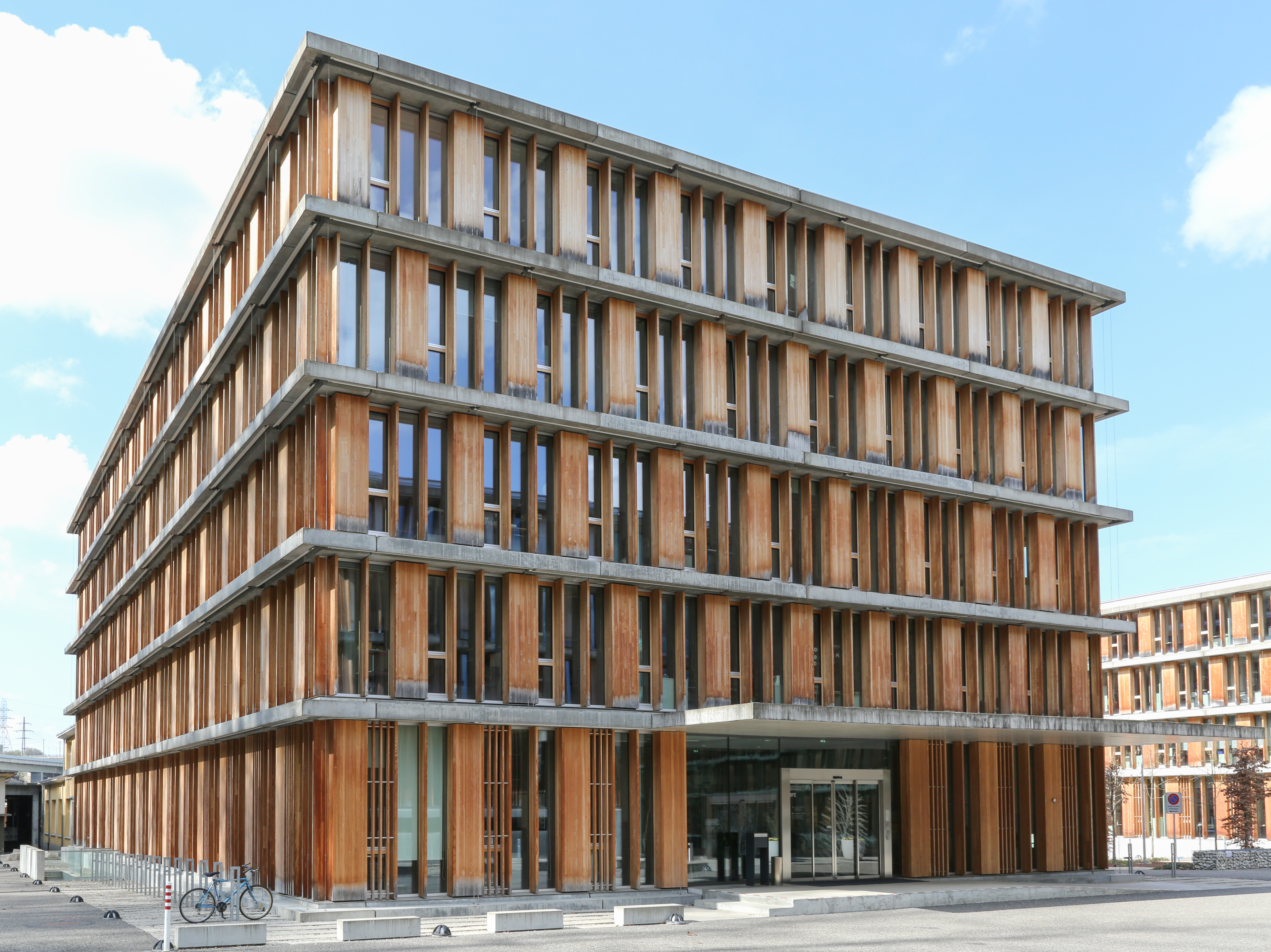 Bundesamt für Energie BFE in Ittigen, Ansicht aus südöstlicher Richtung